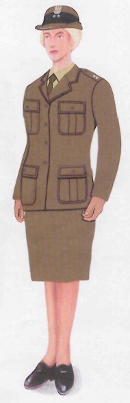 Ubiór wyjściowy żołnierza Wojsk Lądowych kobiety z kapeluszem damskim i spódnicą. Nieobowiązujący (na rok 2012)